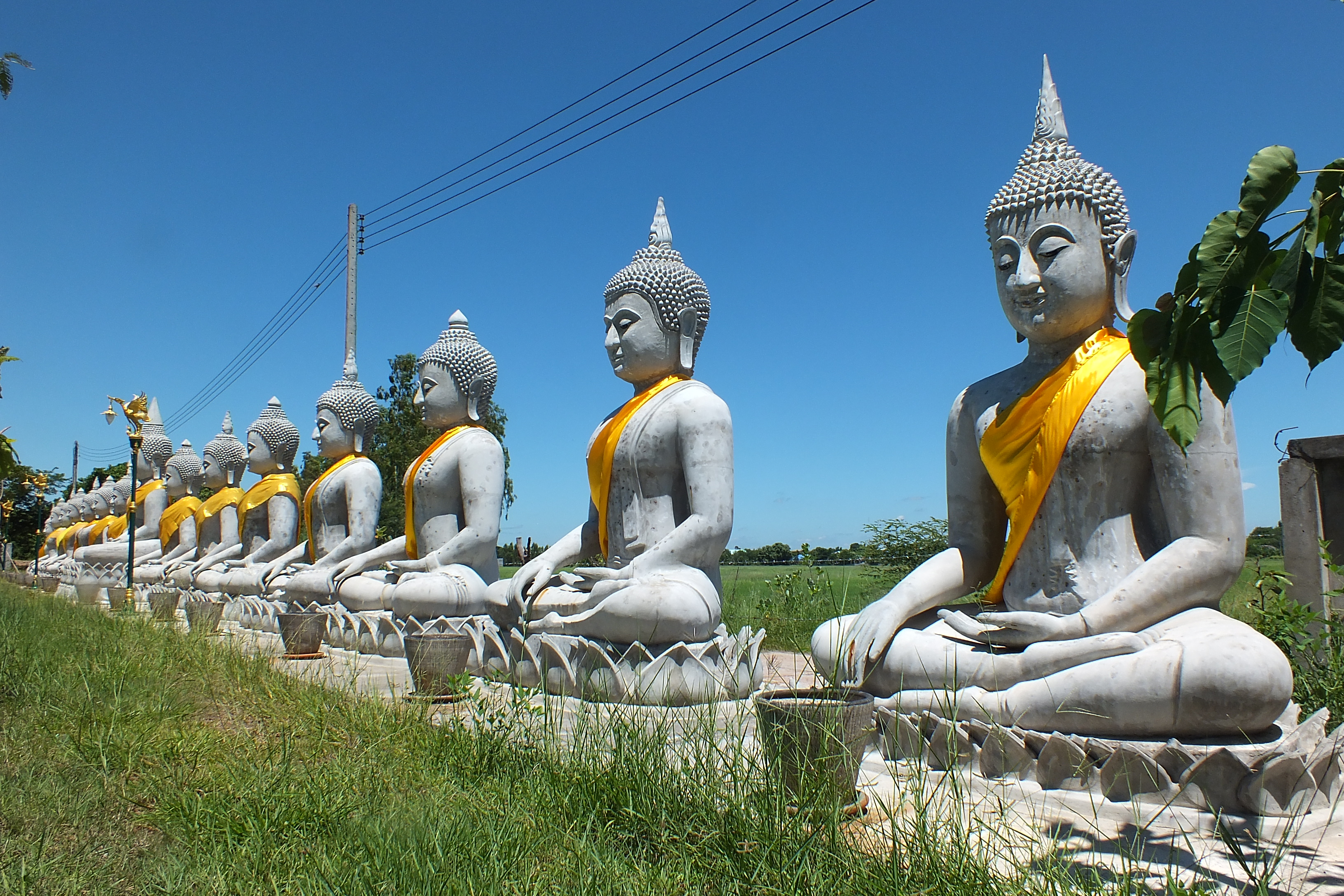 พุทธสถาน ป่าช้าสวนป่า